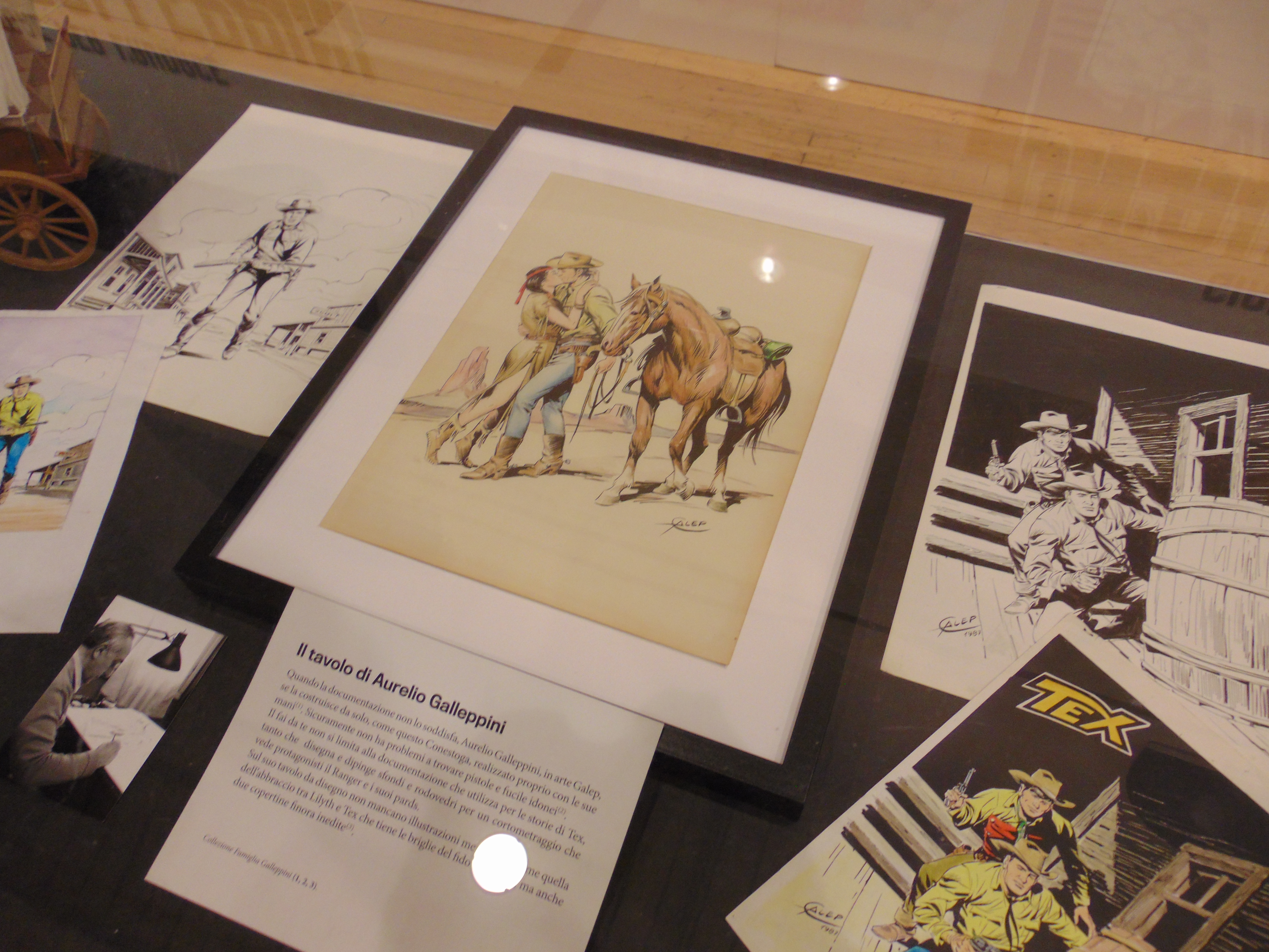 Tex - 70 anni di un mito @ Arf! Festival 2019